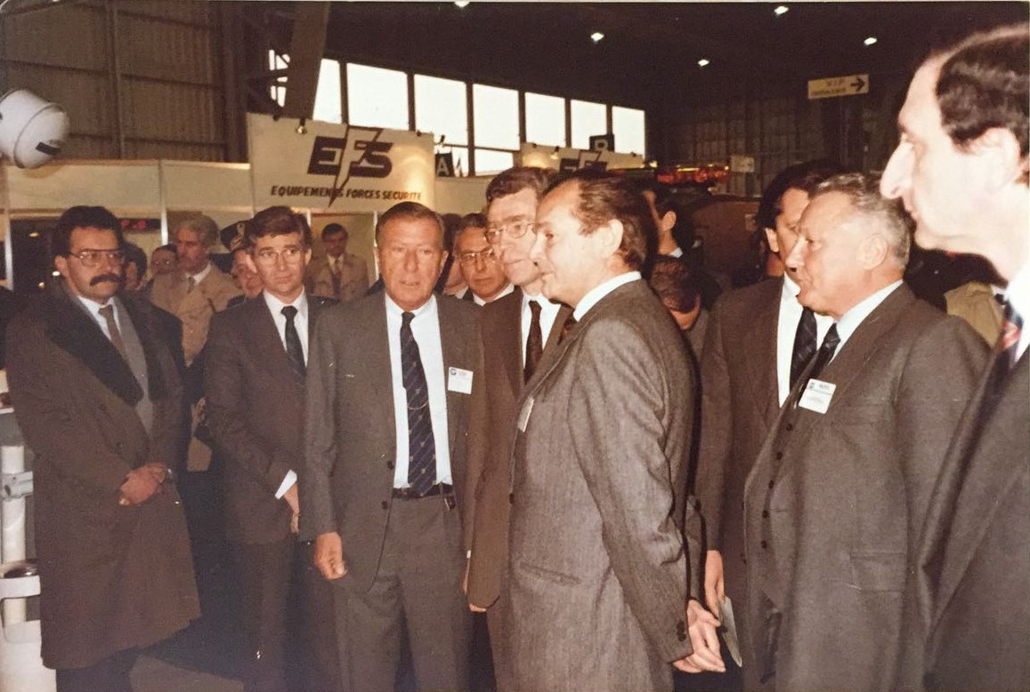 Photo du salon de 1985